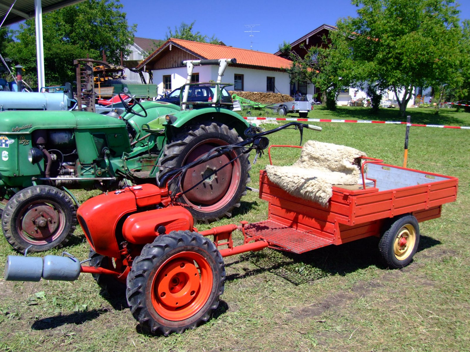 Hako-Einachsschlepper mit HakoMatic-Stufenlosgetriebe